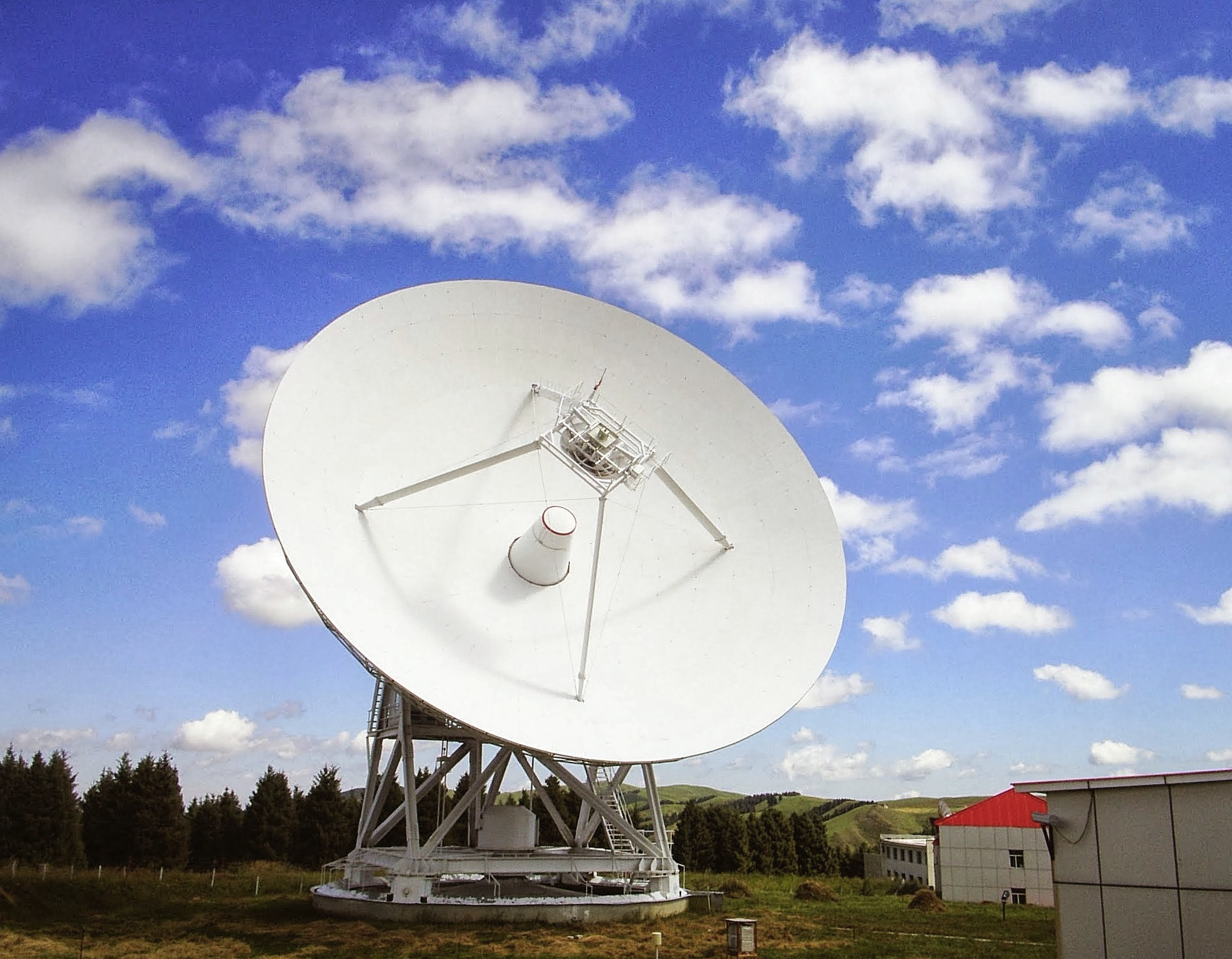 Радиотелескоп РТ-25 относящияйся к Национальной обсерватории Китая был построен в 1957 году. С 1994 года астрономическая станция "Урумчи" включена в Международную РСДБ сеть.